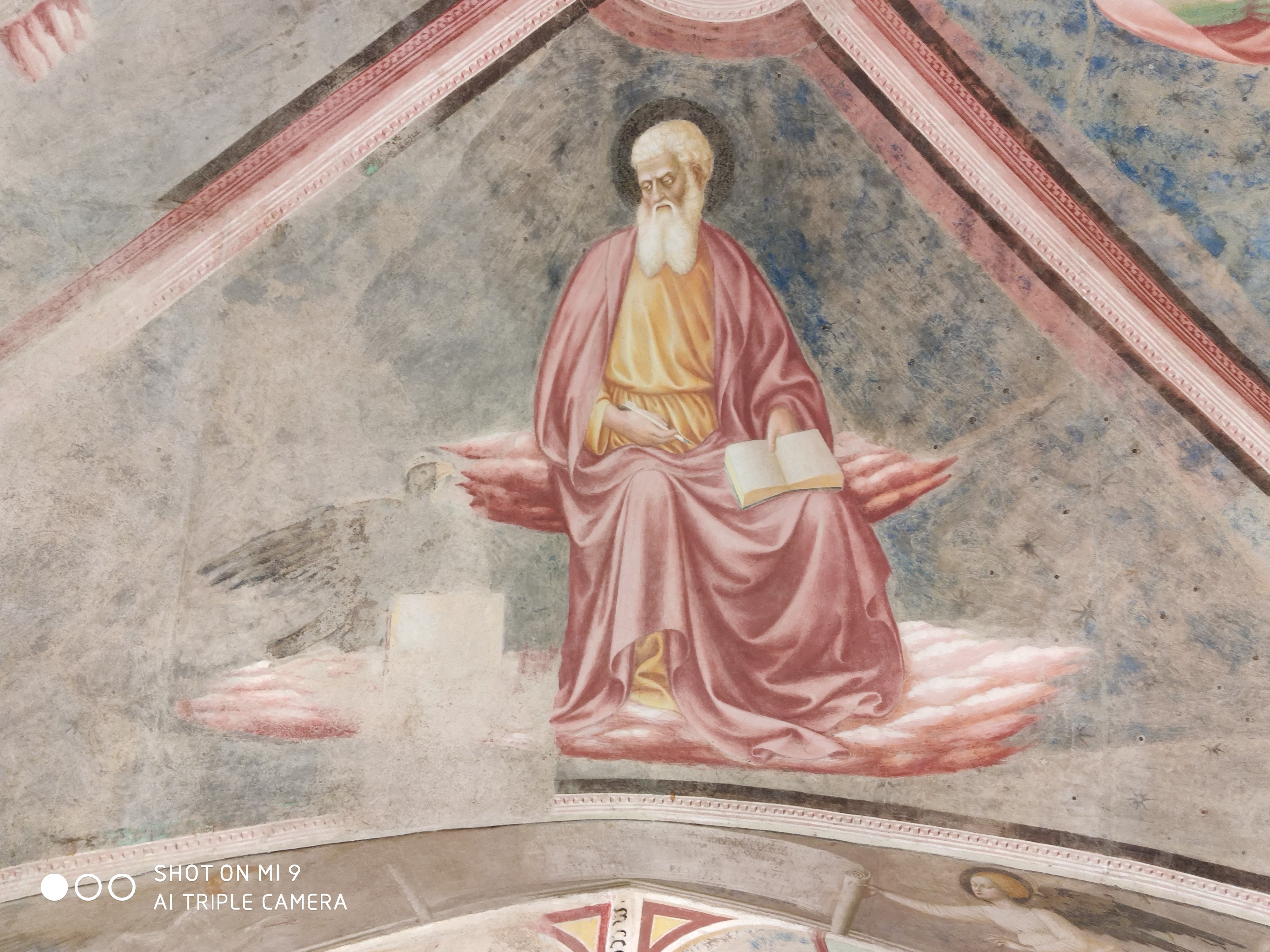 Giovanni Evangelista è qui rappresentato con a fianco il suo simbolo: l'aquila.